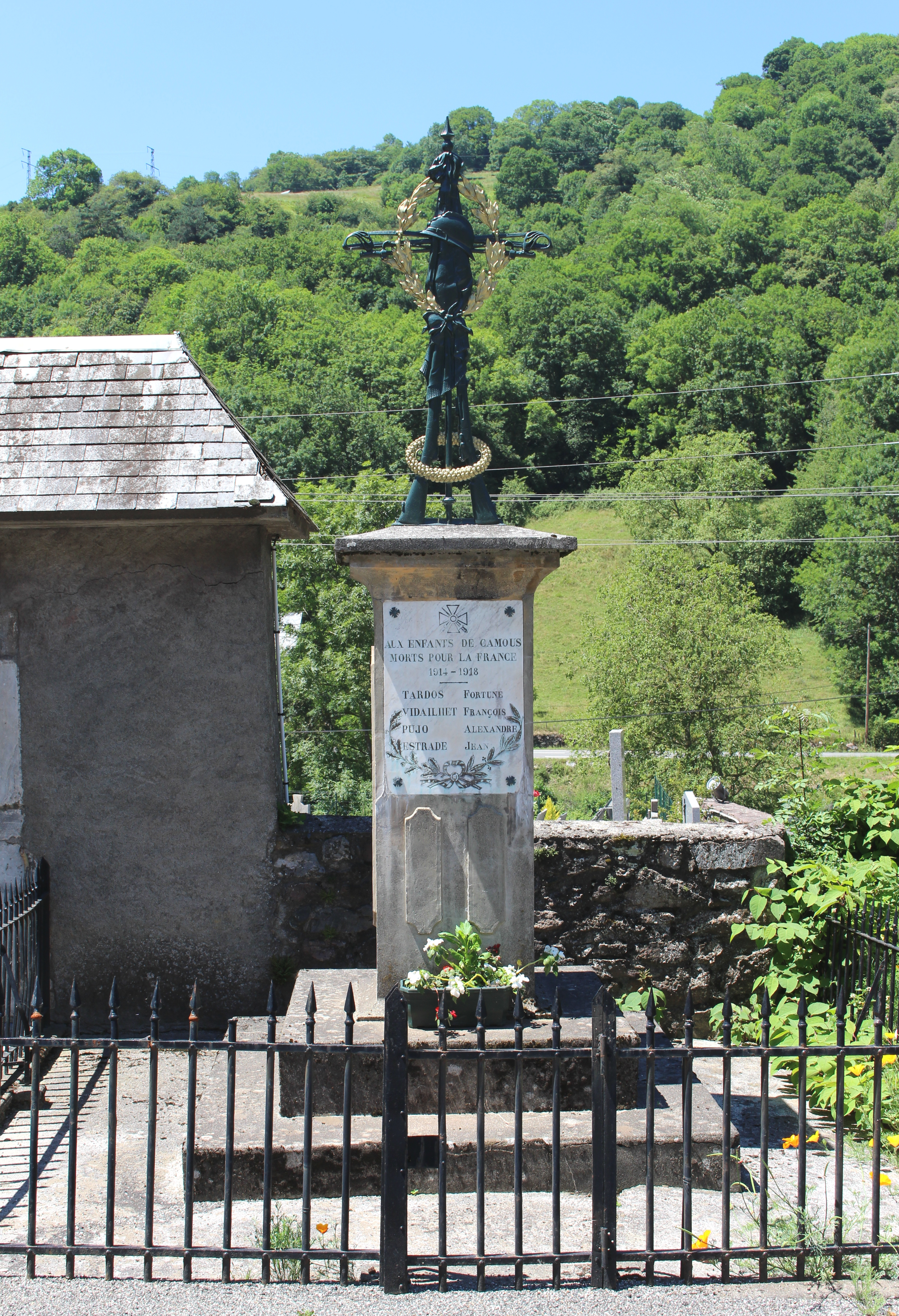 Monument aux morts de Beyrède-Jumet-Camous (Hautes-Pyrénées)